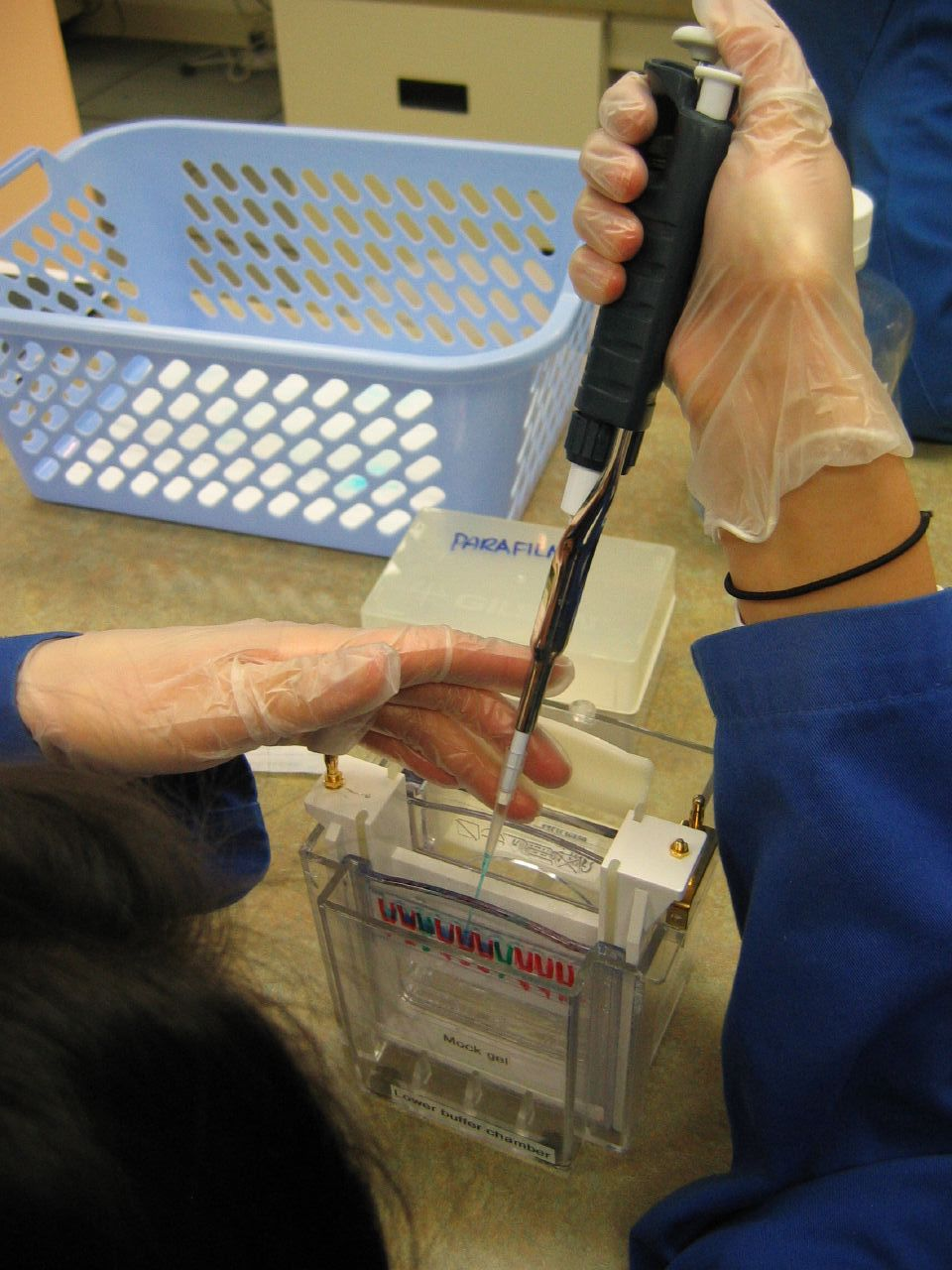 Load a sample into a polyacrilamide gel electrophoresis chamber.